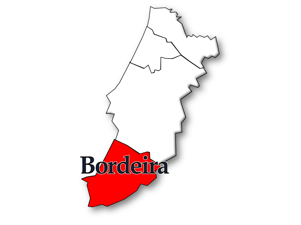 Censos 1864/2011